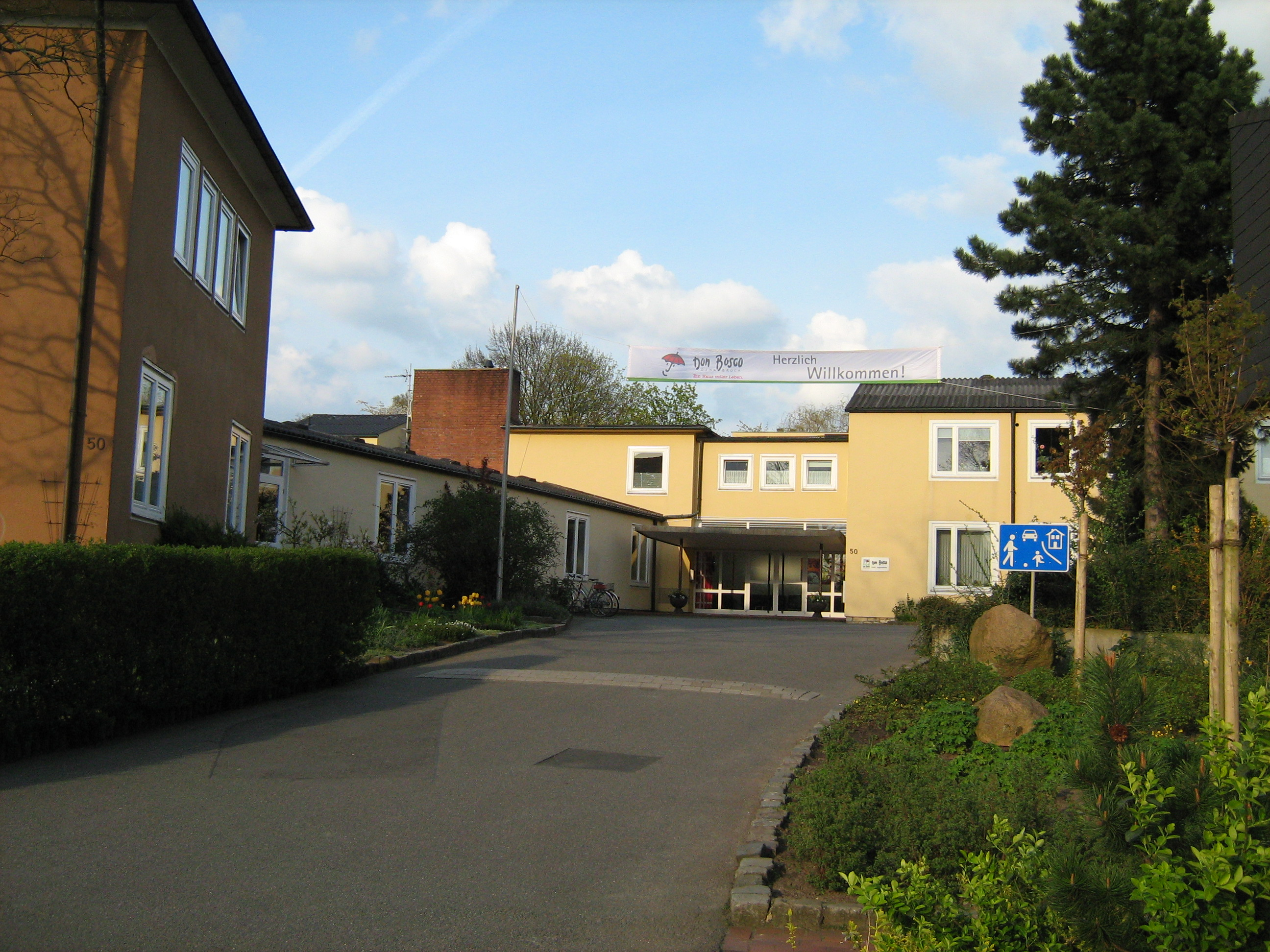 Don Bosco Kath. Jugendhilfe in Osnabrück